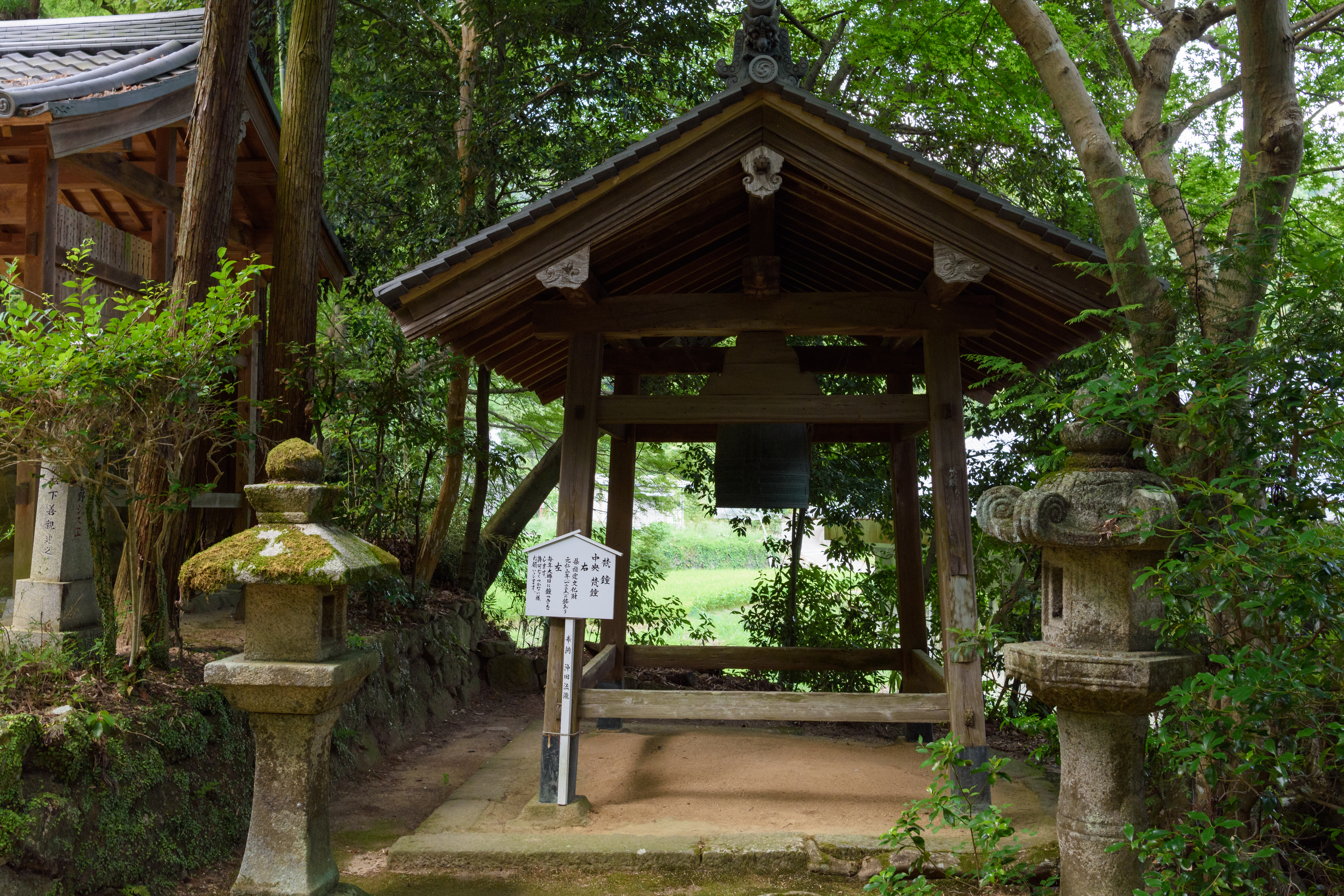 元山上千光寺の鐘楼